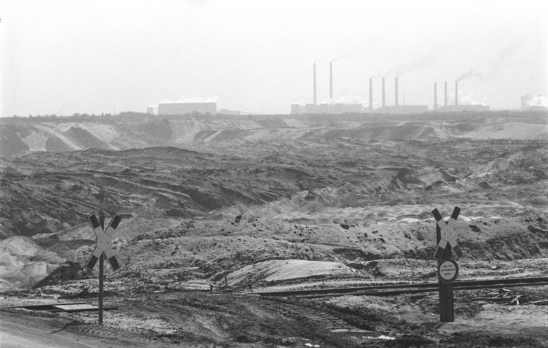 Lausitzer Tagebau ADN-ZB/Weisflog/27.11.89/Bez. Cottbus: Kohle-Konzept auf Einbahnstraße/Bereits 200 Millionen der jährlich in der Republik geförderten 310 Millionen Tonnen Rohbraunkohle stammen aus dem Lausitzer Revier, 60 Prozent der erkundeten Vorräte lagern hier. Obwohl das Territorium zunehmend unter den unhaltbaren Folgen des als "Einbahnstraße" betriebenen Energiekonzepts leidet, kommt ein Stop der Lausitzer Tagebaue derzeit nicht in Frage. Immerhin liefern sie die schwefelärmste Kohle aller DDR-Reviere. Die leistungsfähigsten Wärmekraftwerke und mit dem Gaskombinat Schwarze Pumpe (im Hintergrund) auch die modernsten Veredelungsanlagen befinden sich in diesem Teil des Landes.